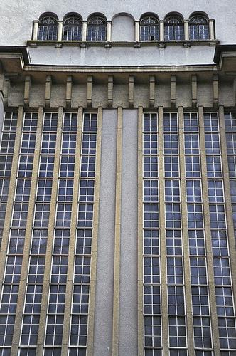 Hochfassade des Bad Kissinger Schlachthofes